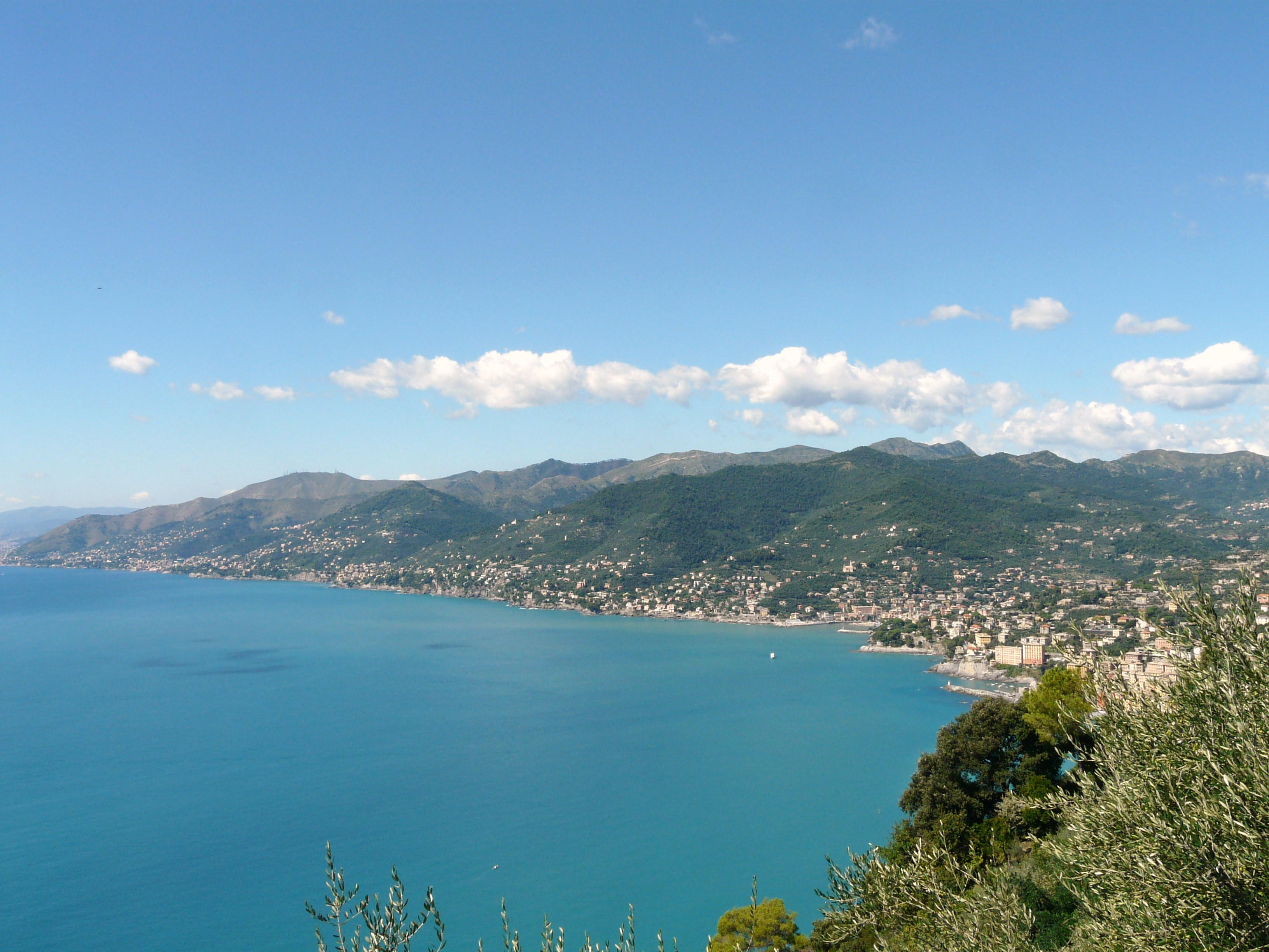 Panorama del Golfo Paradiso da San Rocco di Camogli, Camogli, Liguria, Italia